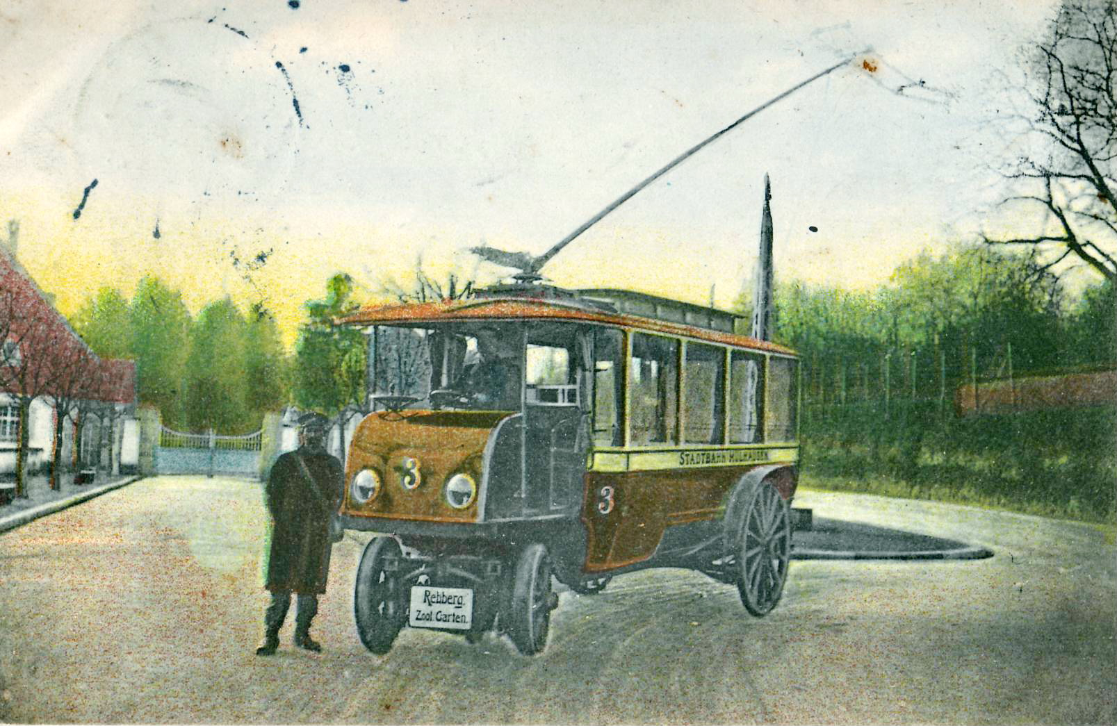 Carte postale ancienne, sans mention d'éditeur, n°R488 : Mulhausen / Mulhouse - Geleislose Vue en grois plan d'un des premiers trolleybus, cilculant sur la ligne du Rebberg (1908-1918).